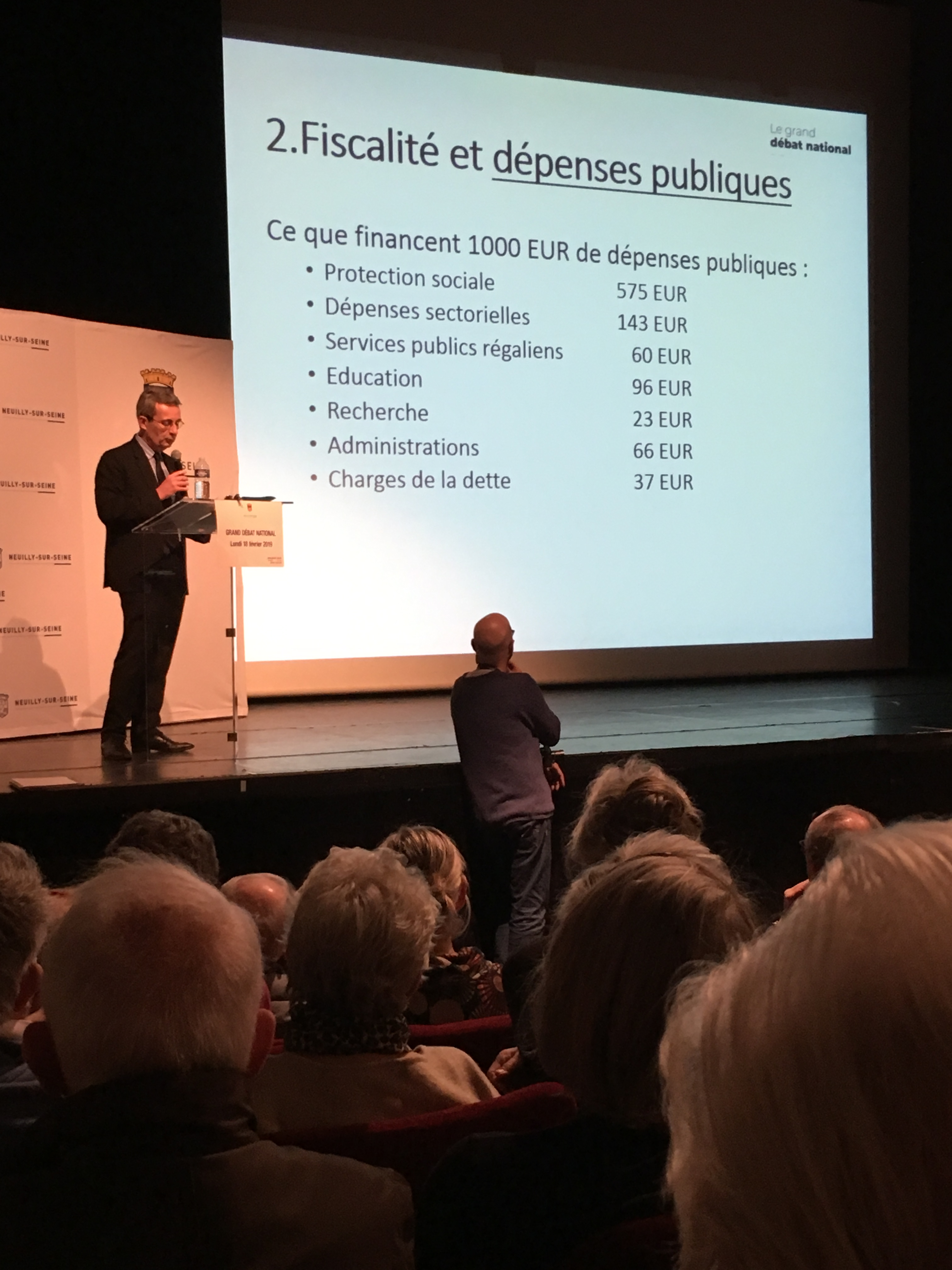 Lancement du Grand débat national à Neuilly sur Seine le 18 février 2019 par le maire Jean-Christophe Fromantin